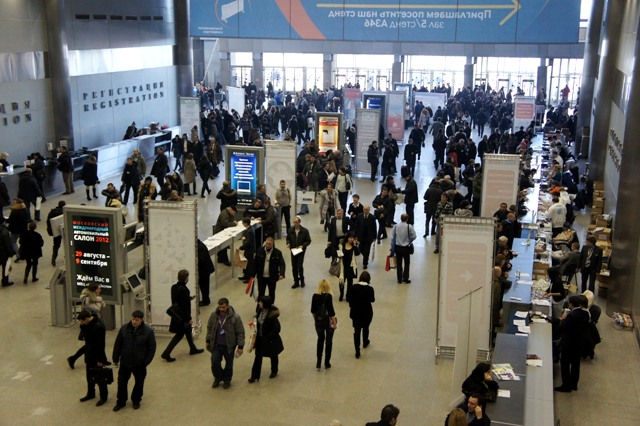 Весь холл павильона 2 наполнен посетителями Аква-Терм